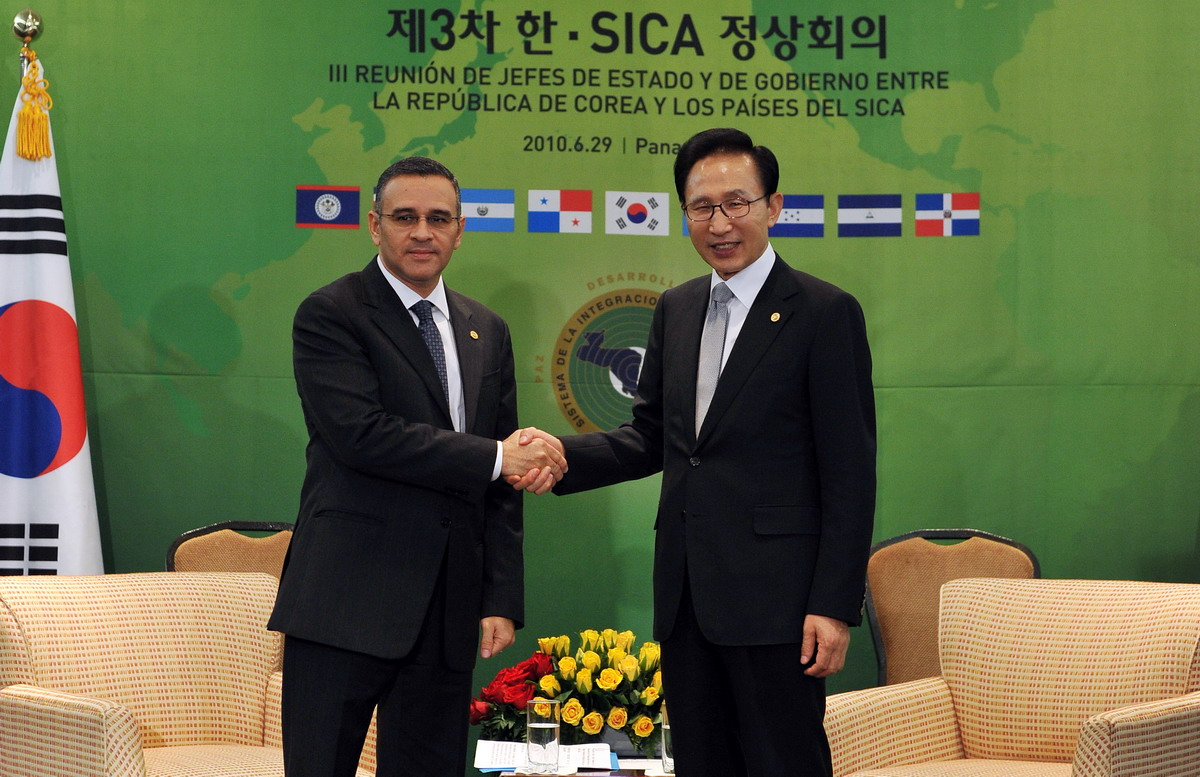 President Lee (r) meeting with El Salvador’s President Mauricio Funes (l) on Tuesday (Jun. 29).